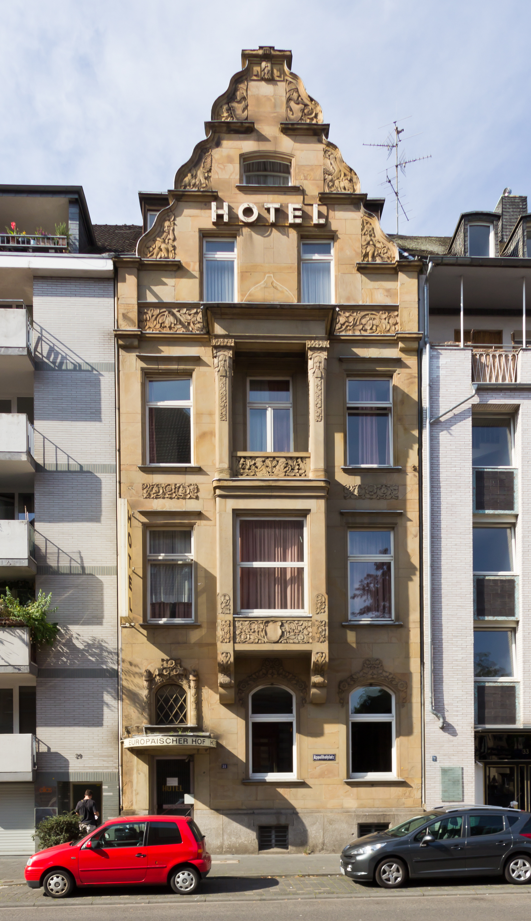 Denkmalgeschütztes Wohn- und Geschäftshaus, Hotel Europäischer Hof, Appellhofplatz 31, Köln. Baujahr: um 1900